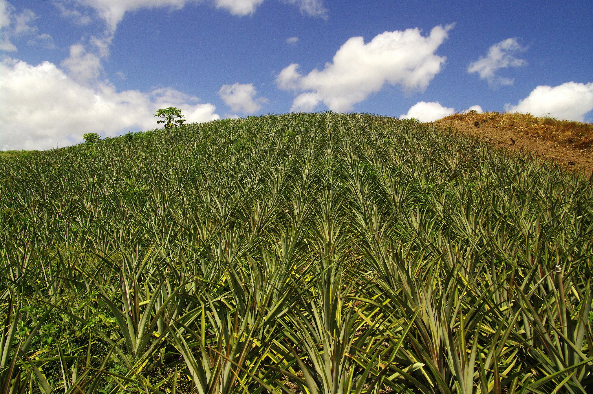 Fruticultura Irrigada de Abacaxi no interior do Rio Grande do Norte, Brasil.